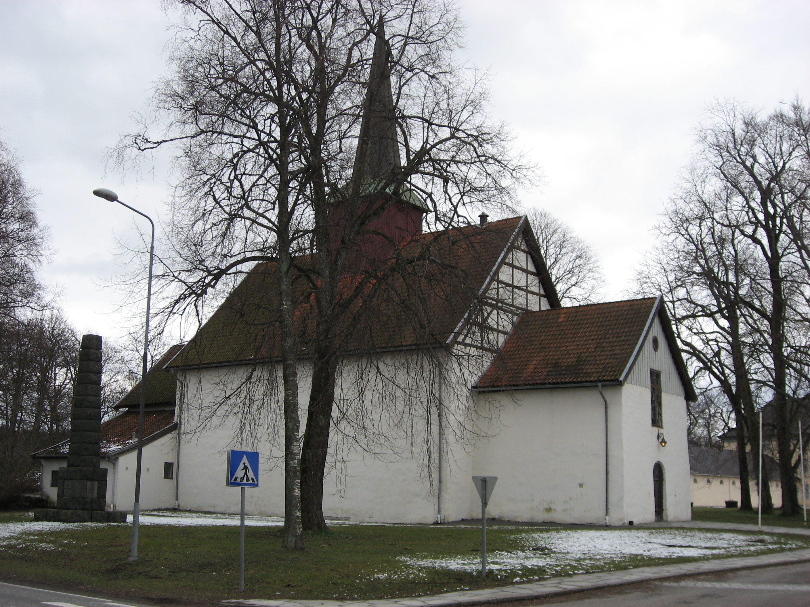 Sem kirke, ca 1100